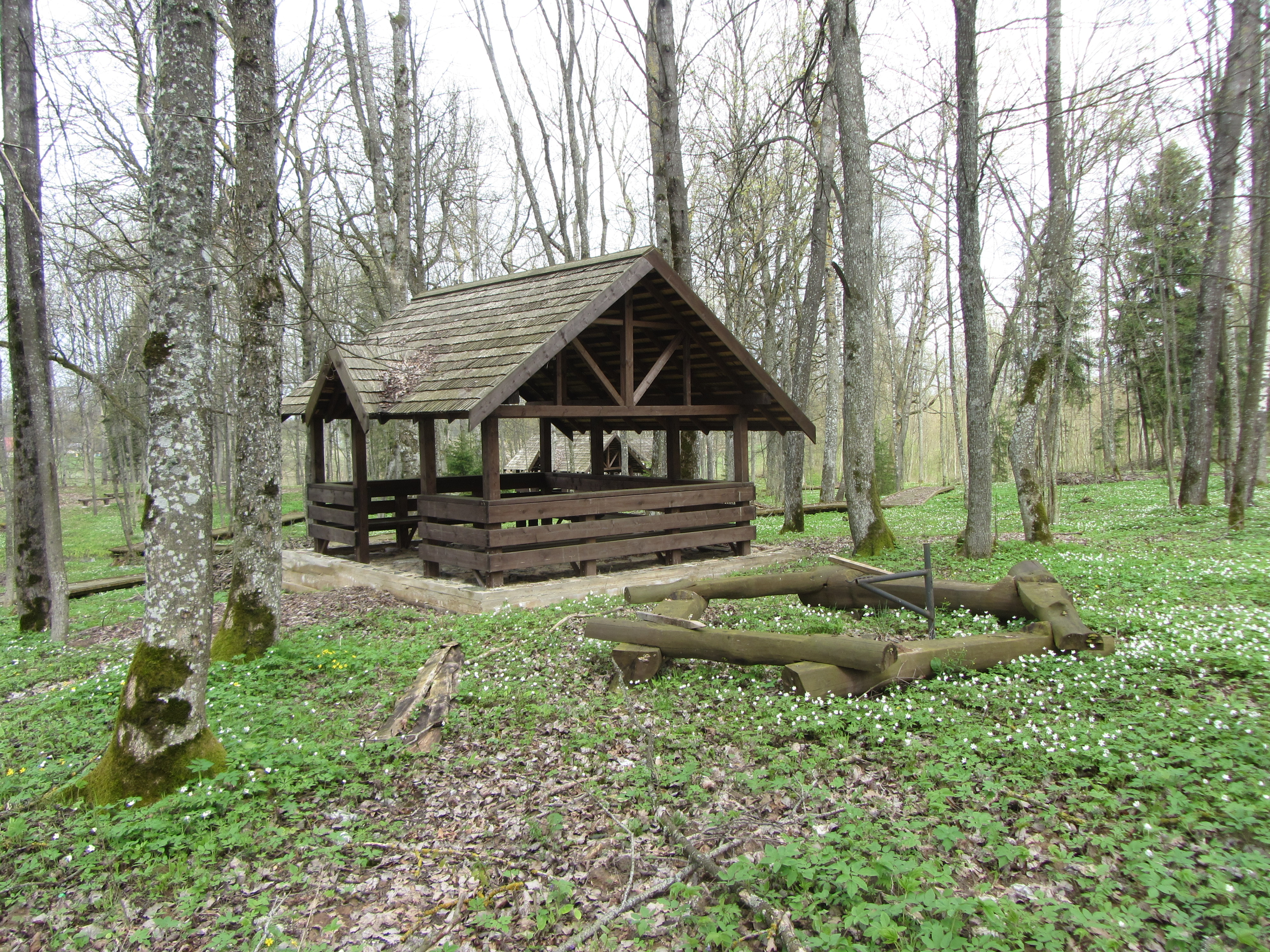 Luokesos sen., Lithuania